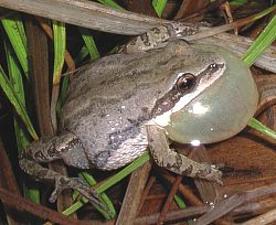 Pseudacris triseriata Origine de l'image Ohio Department of Natural Resources Division of Wildlife COPYRIGHT Information presented on this site is considered public information and may be distributed or copied unless otherwise noted. Use of appropriate byline/photo/image credits is required.